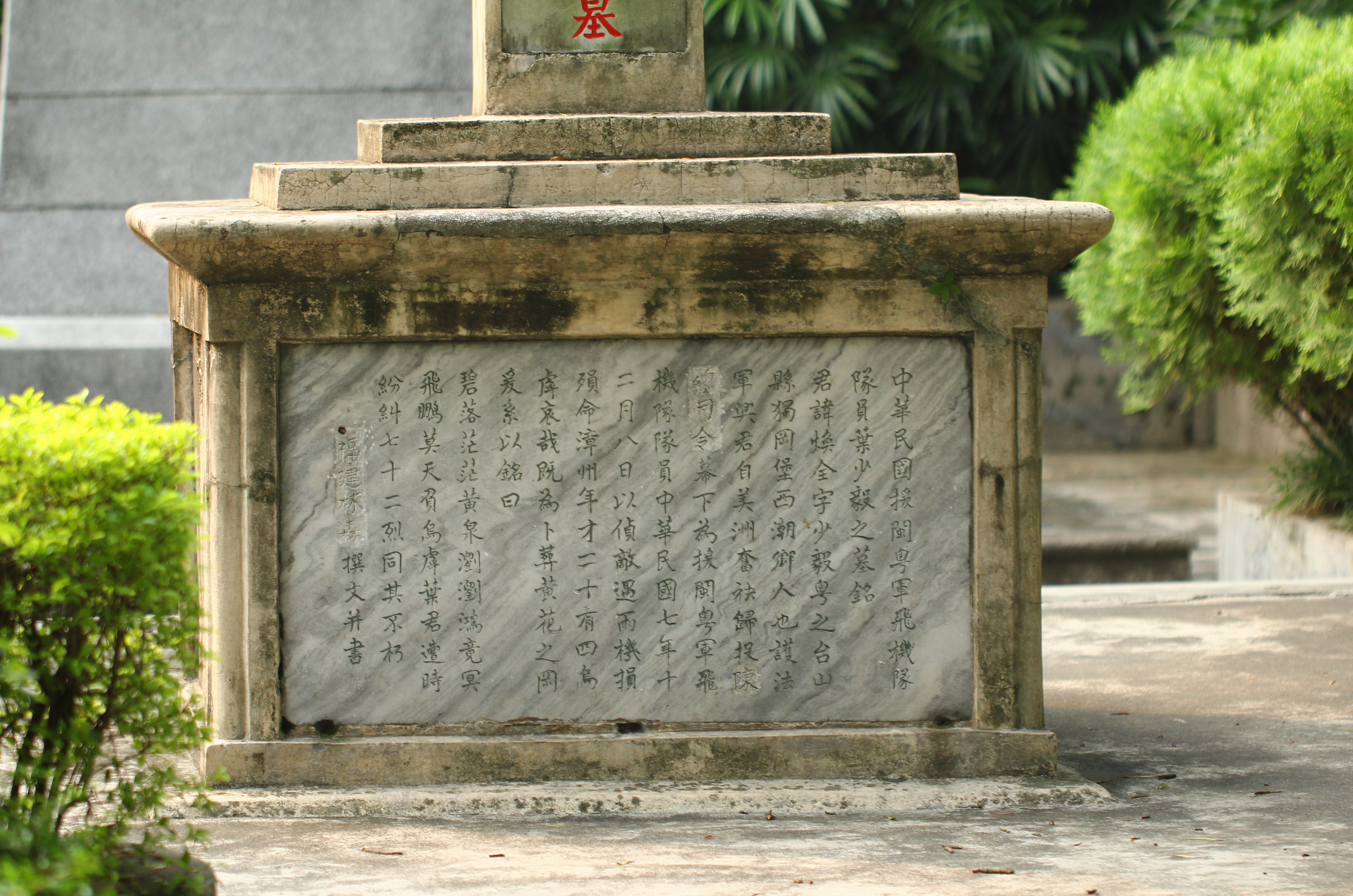 銘文： 中華民國援閩粵軍飛機隊隊員葉少毅之墓銘 君諱煥全字少毅粵之台山縣獨岡堡西湖鄉人也護法軍興君自美洲奮袂歸投陳總司令幕下為援閩粵軍飛行隊員中華民國七年十二月八日以偵敵遇雨機損殞命樟州年才二十有四烏虖哀哉既為卜葬黃花之岡爰系以銘曰 碧落茫茫黃泉瀏瀏鴻竟冥飛鵬英天負烏虖葉君遭時紛糾七十二烈同其不朽 福建林森撰文並書